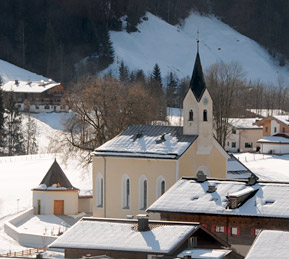 Pfarrkirche hl. Rupert in Kelchsau